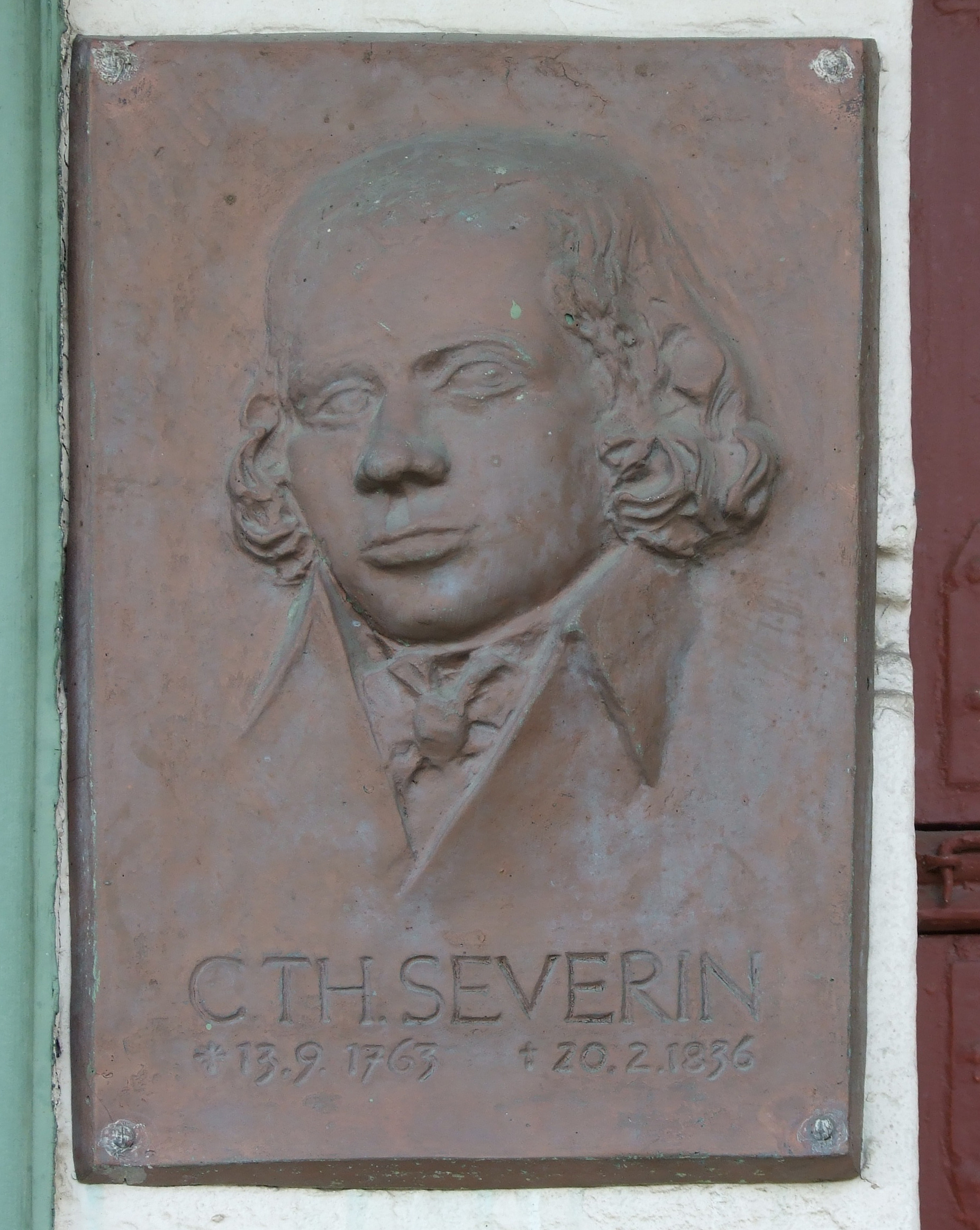 Carl Theodor Severin Tafel an seinem Wohnhaus in Bad Doberan (Haus Gottesfrieden)